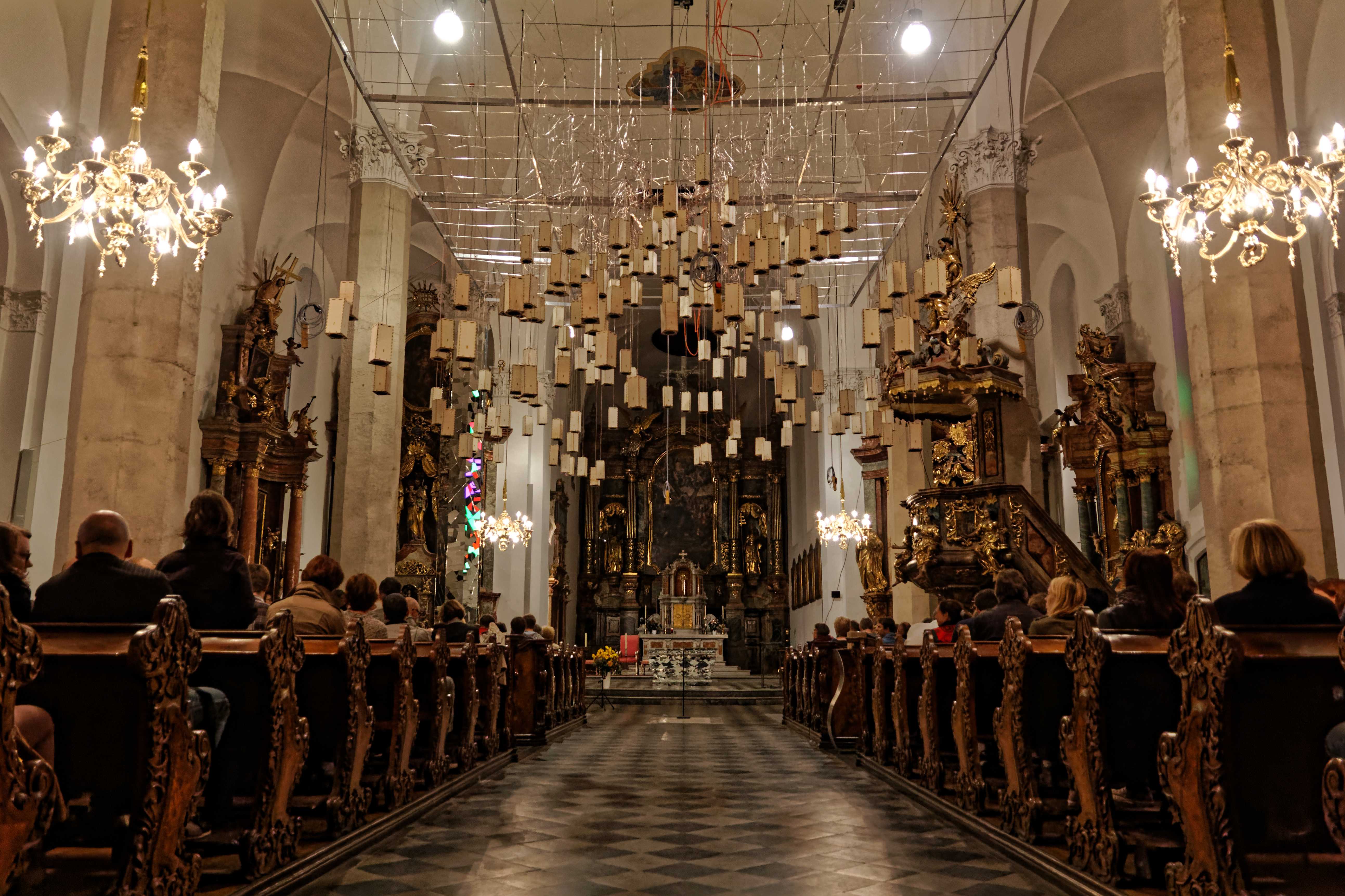 Uraufführung von Expansion of the Universe in der Kirche St. Andrä in Graz (2014) Foto: Andreas Pikal